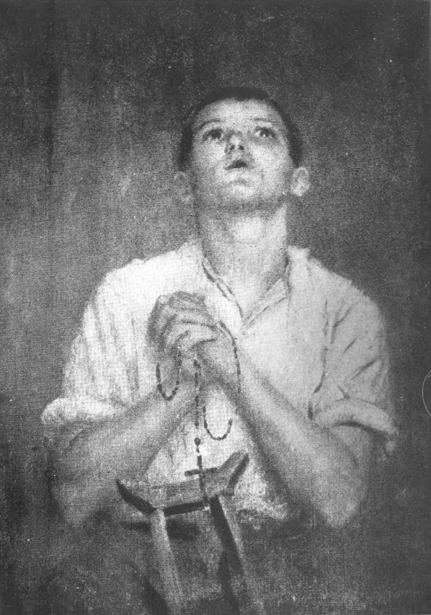 Obra do Projeto Eliseu Visconti